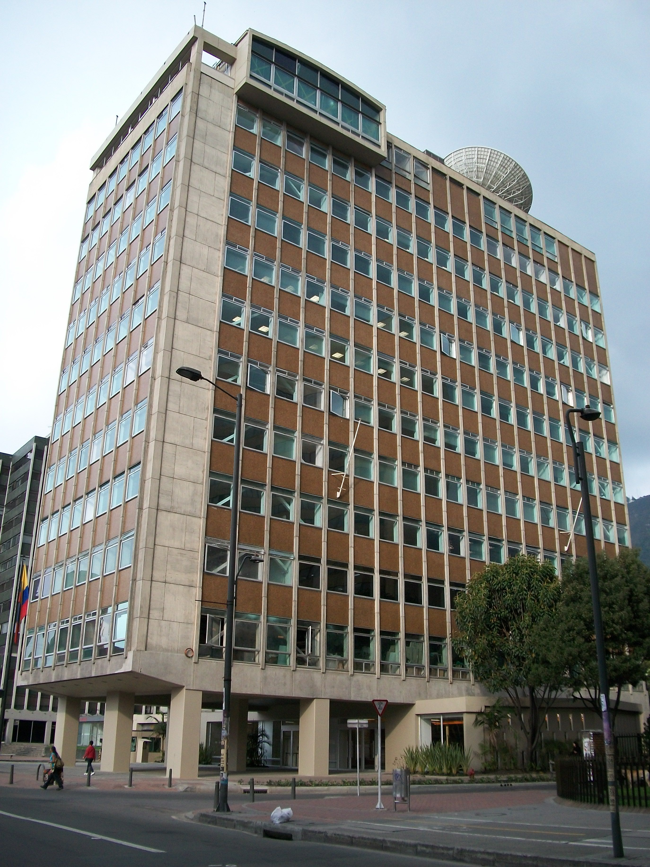 Edificio Ecopetrol en Bogotá en la Carrera Trece con Calle Trinta y cuatro.